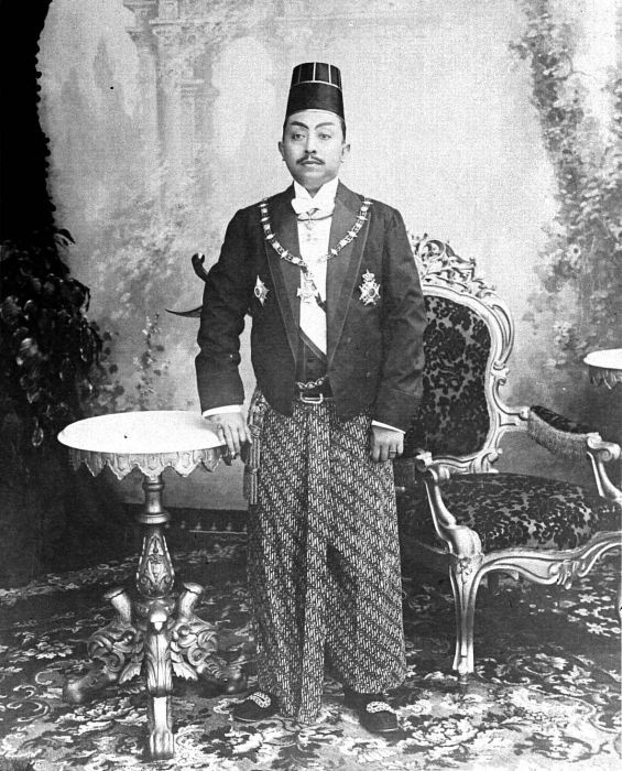 Repronegatief. Portret van Zijne Hoogheid Pakoe Boewono X, de soesoehoenan van Soerakarta